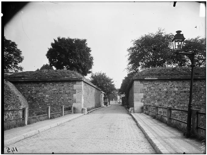 Porte